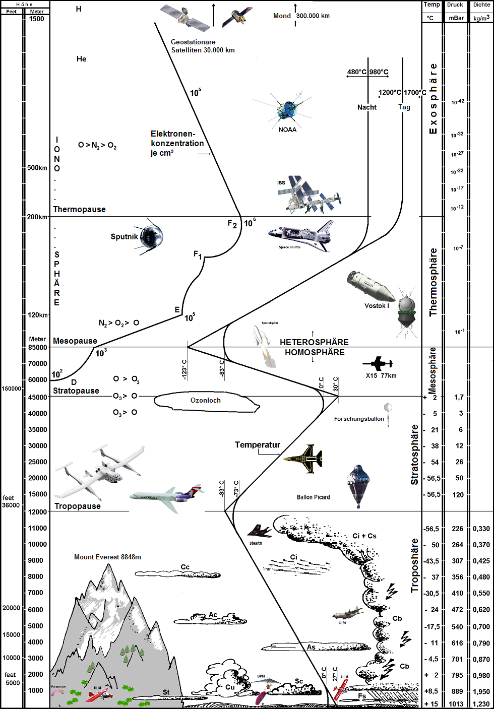 Atmoshäre und Ionosphäre